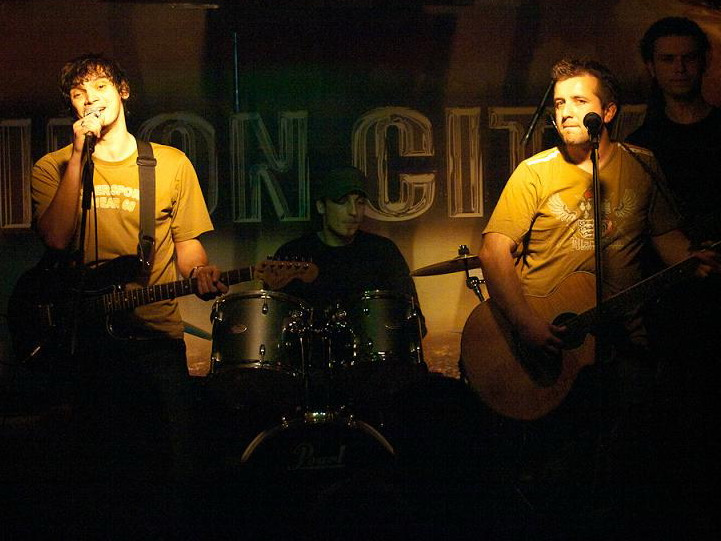 Fără Zahăr în concert la Iron City, București, 2010.